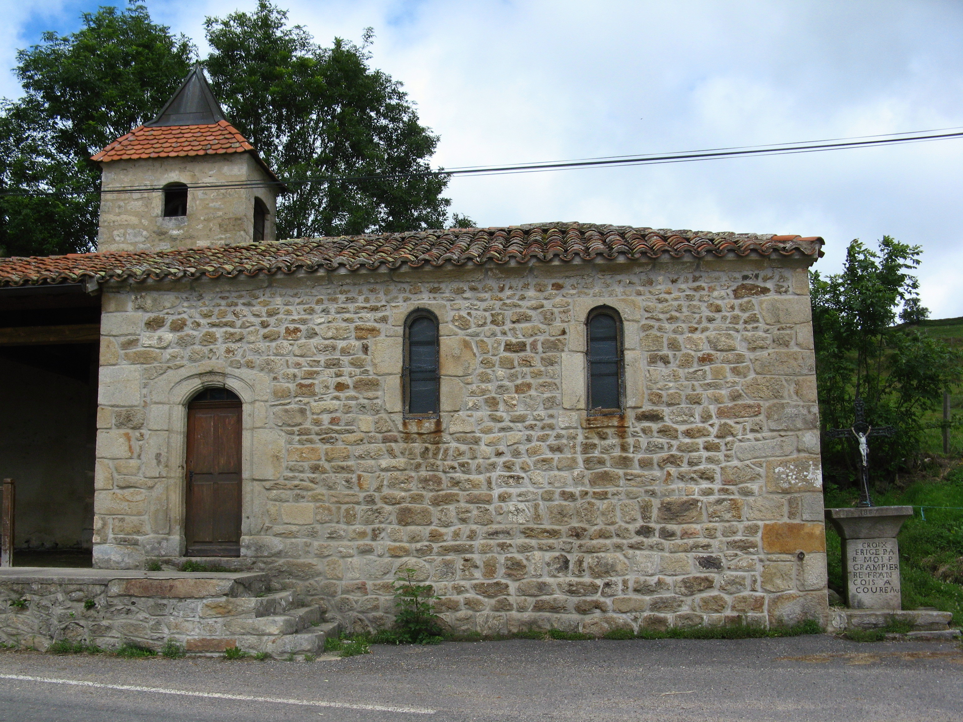 Saint-Bonnet-le-Courreau, chapelle de Courreau